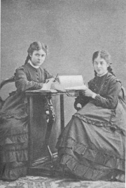 Le sorelle Vera (1852-1942) ed Evgenija Figner (1858-1931)